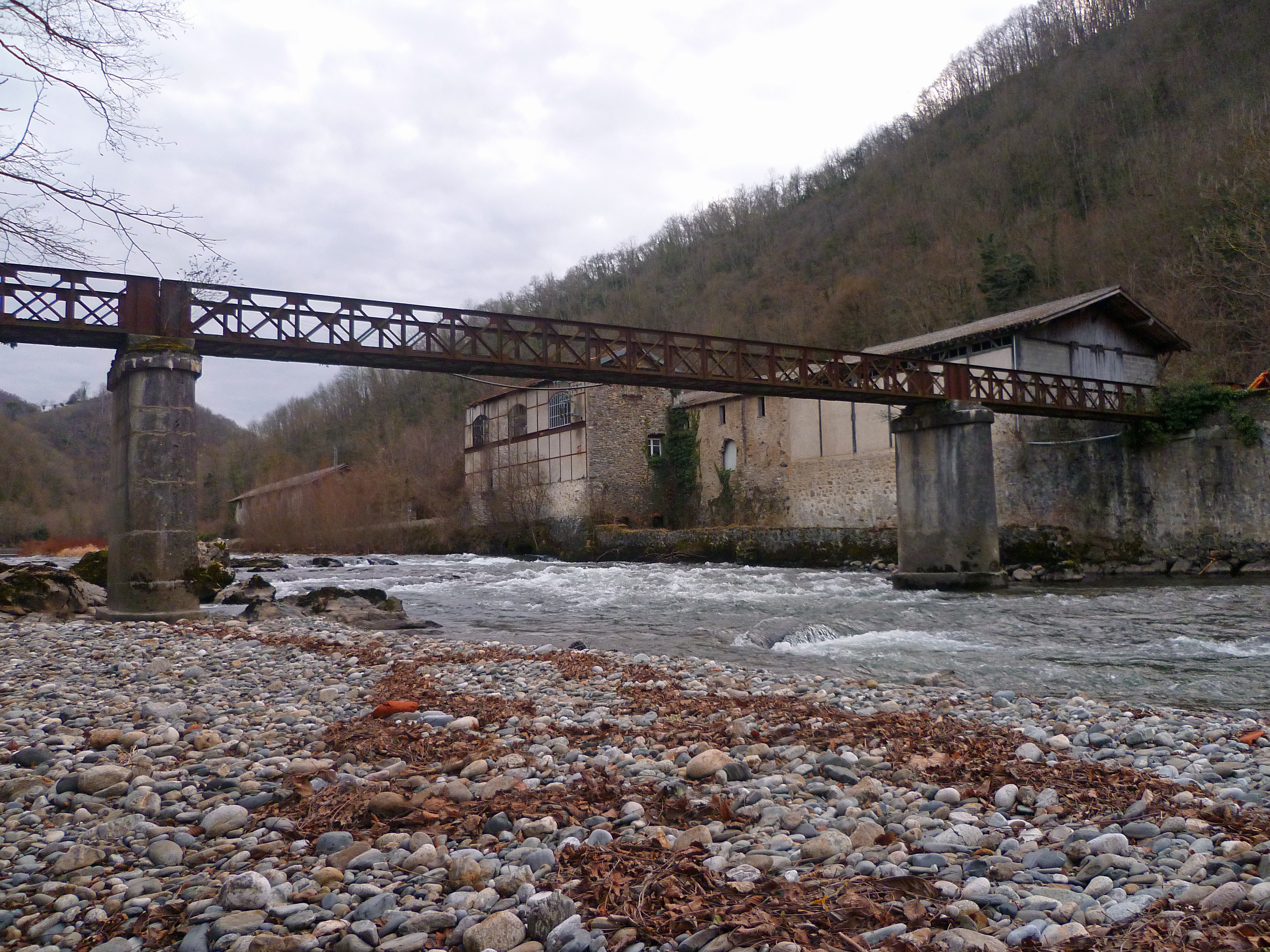 Encourtiech (Ariège, Midi-Pyrénées, France) : Passerelle abandonnée sur le Salat à La Borye et vue d'Eycheil sur l'autre rive.